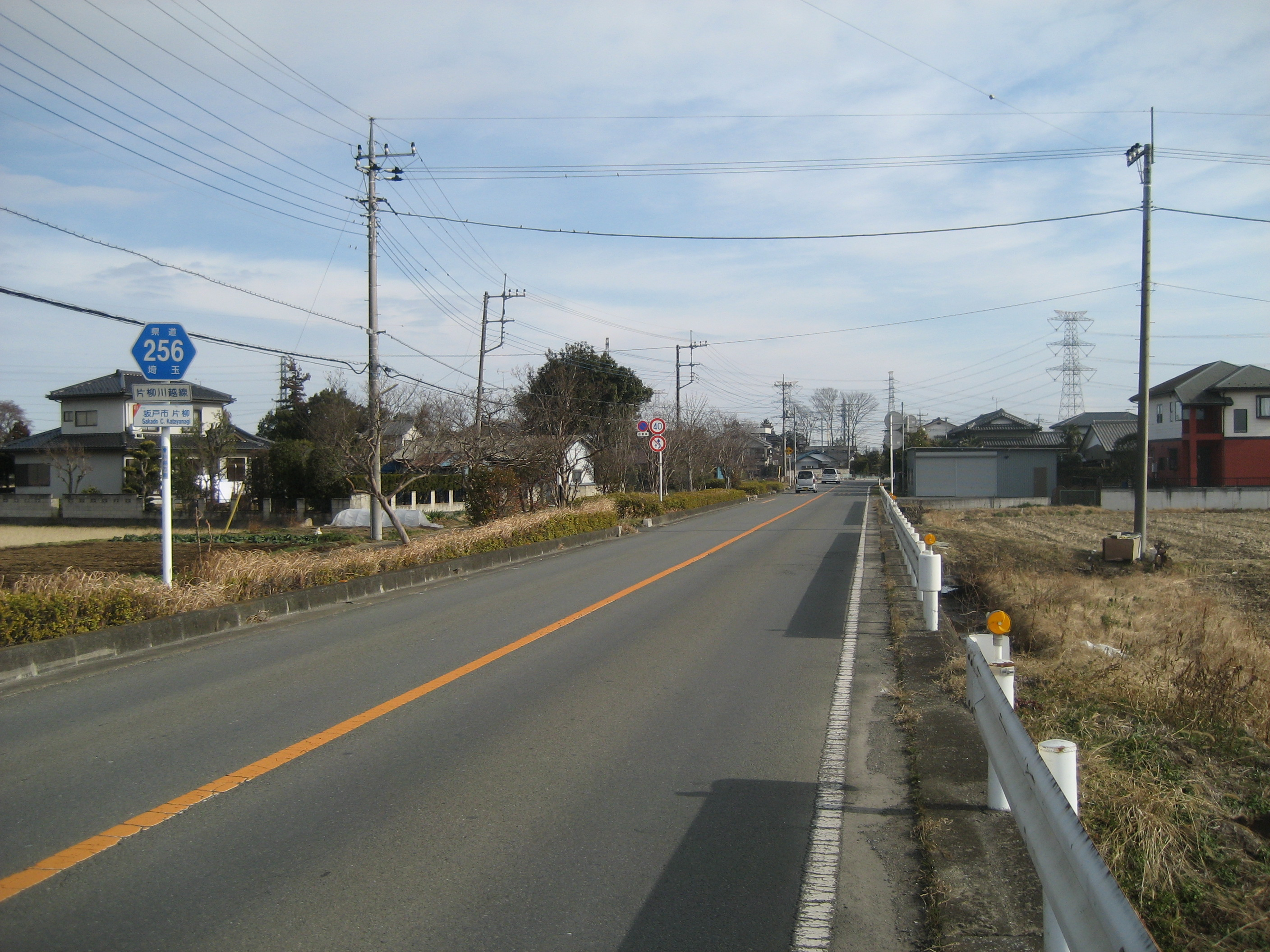 埼玉県道256号線坂戸市片柳付近